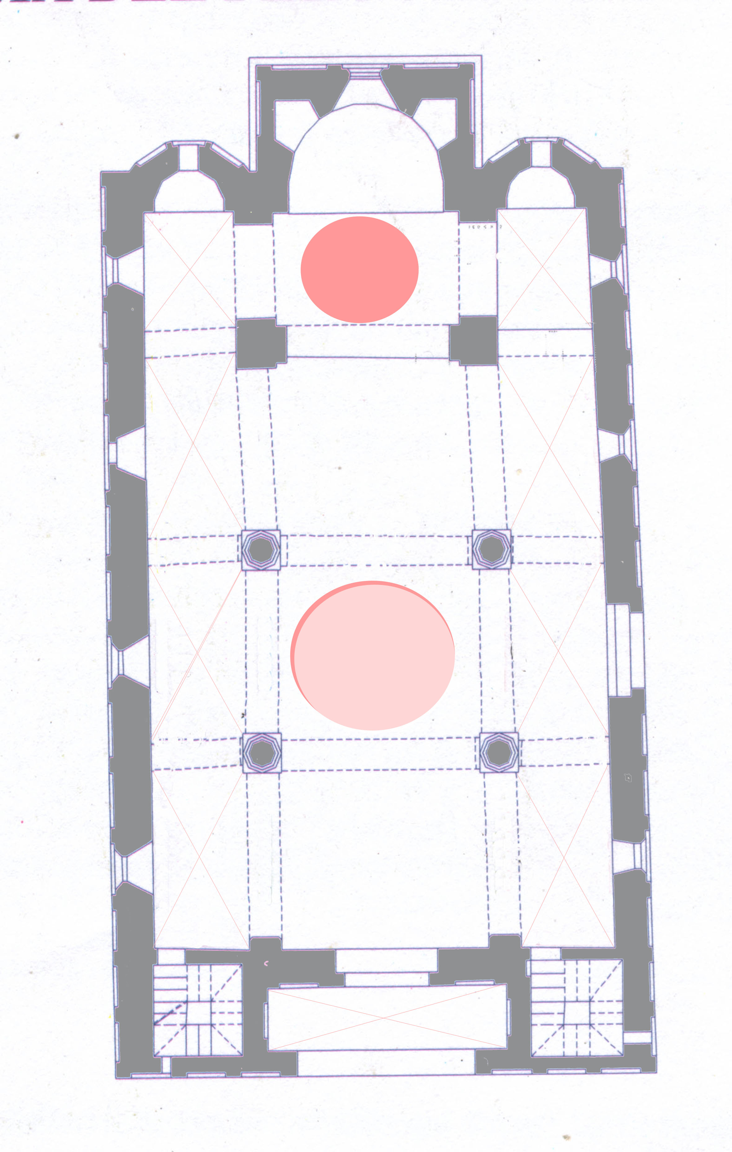 Chiesa dei SS Pietro e Paolo d'Agrò Pianta